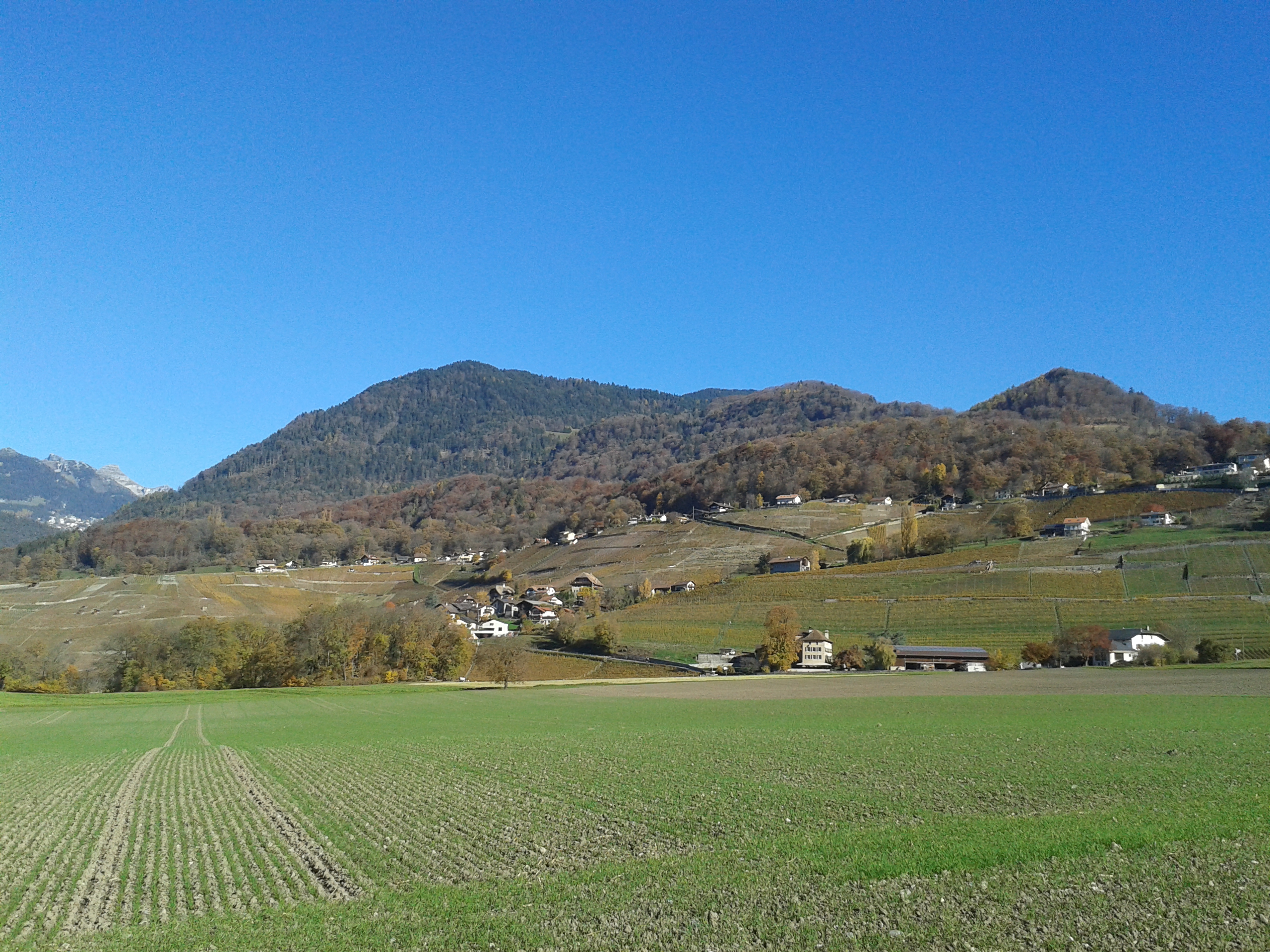 Plaine entre Villy et Salaz ainsi qu'Antagnes et son vignoble.